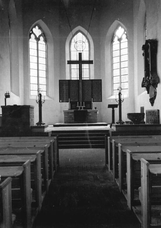 Illus-Biscan Leu-Be. 18.6.51 Wiederaufbau der Heilig-Geist-Kirche in Magdeburg. Die durch den II. Weltkrieg zerstörte Heilig-Geist-Kirche in Magdeburg wurde in jahrelanger Arbeit wieder aufgebaut. UBz, Das Kirchenschiff nach dem Wiederaufbau. (Siehe Bild 12 N)